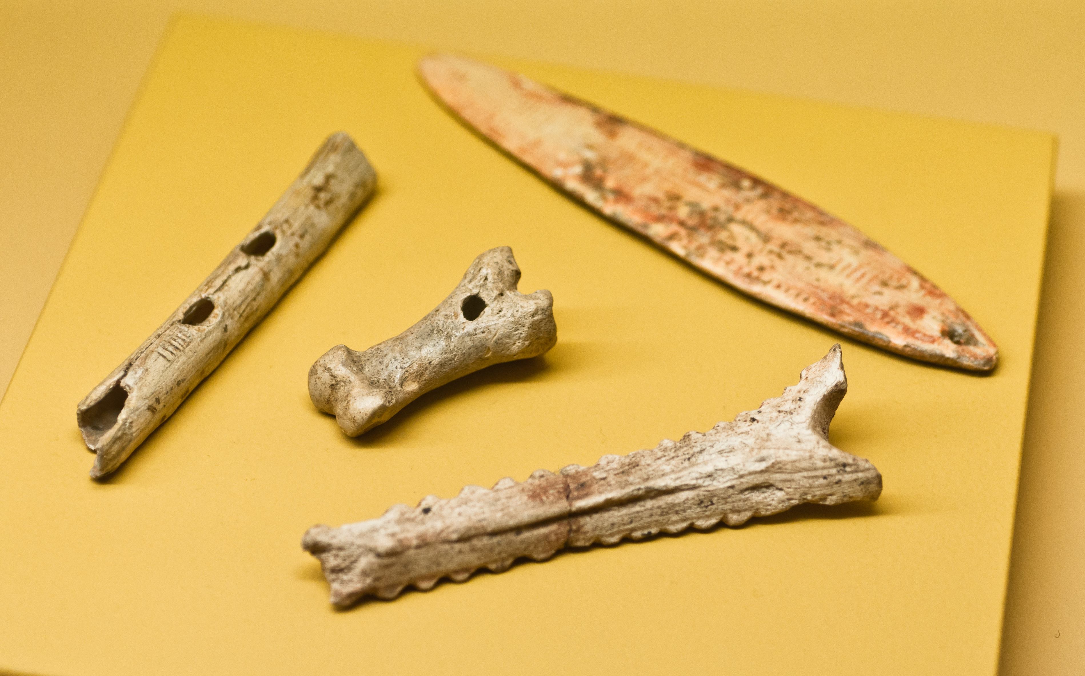 Instruments de musique préhistoriques : Flûte en os (Isturitz, Pyrénées-Atlantiques) Sifflet en os (Laugerie-Basse, Dordogne) Rhombe en bois de renne (Lalinde, Dordogne) Racleur en bois de renne (Mas d'Azil, Ariège) Collections du Musée d'Archéologie Nationale